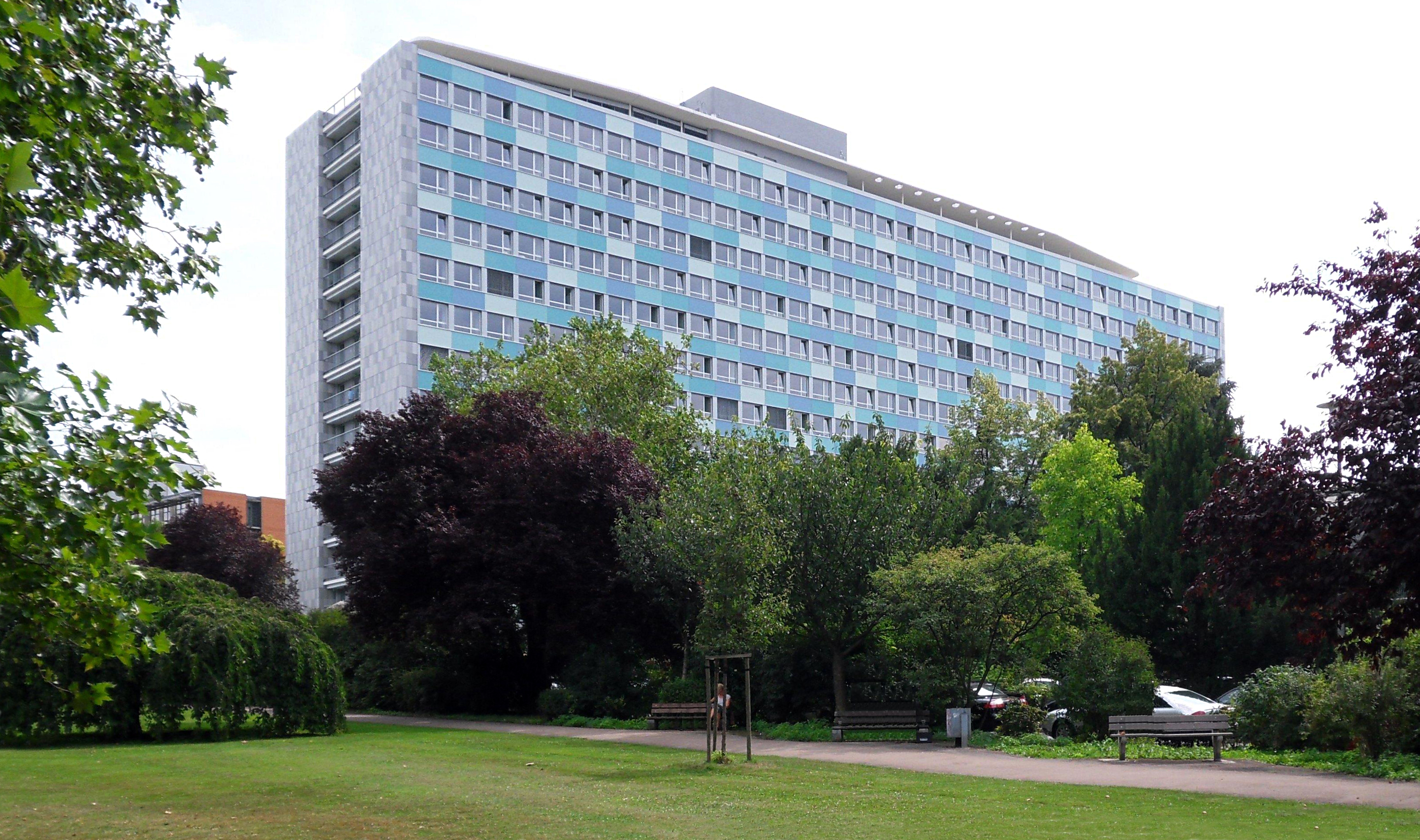 Blick vom Gustav-Stresemann-Ring auf die Fensterfront des Statistischen Bundesamtes in Wiesbaden.